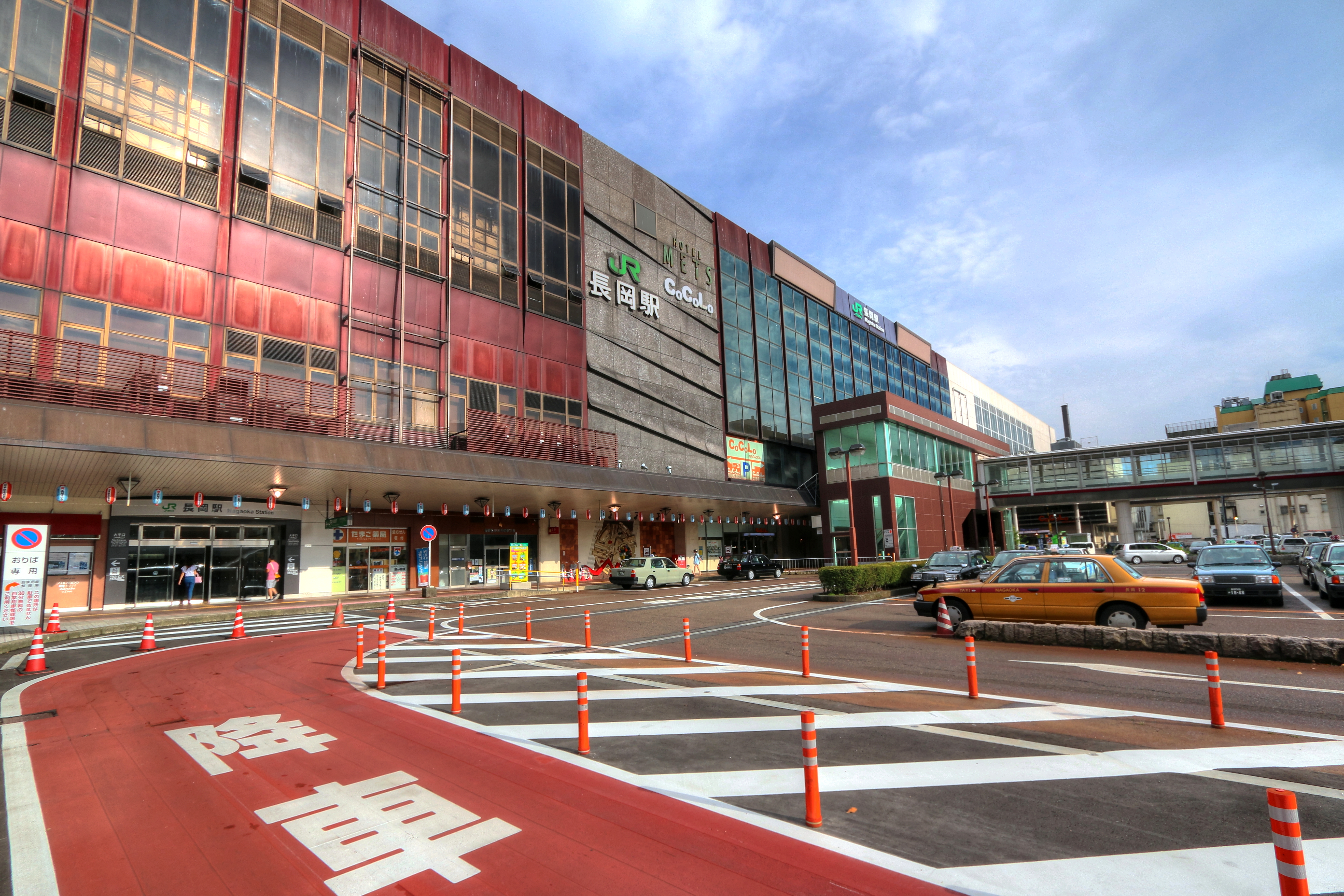 長岡駅